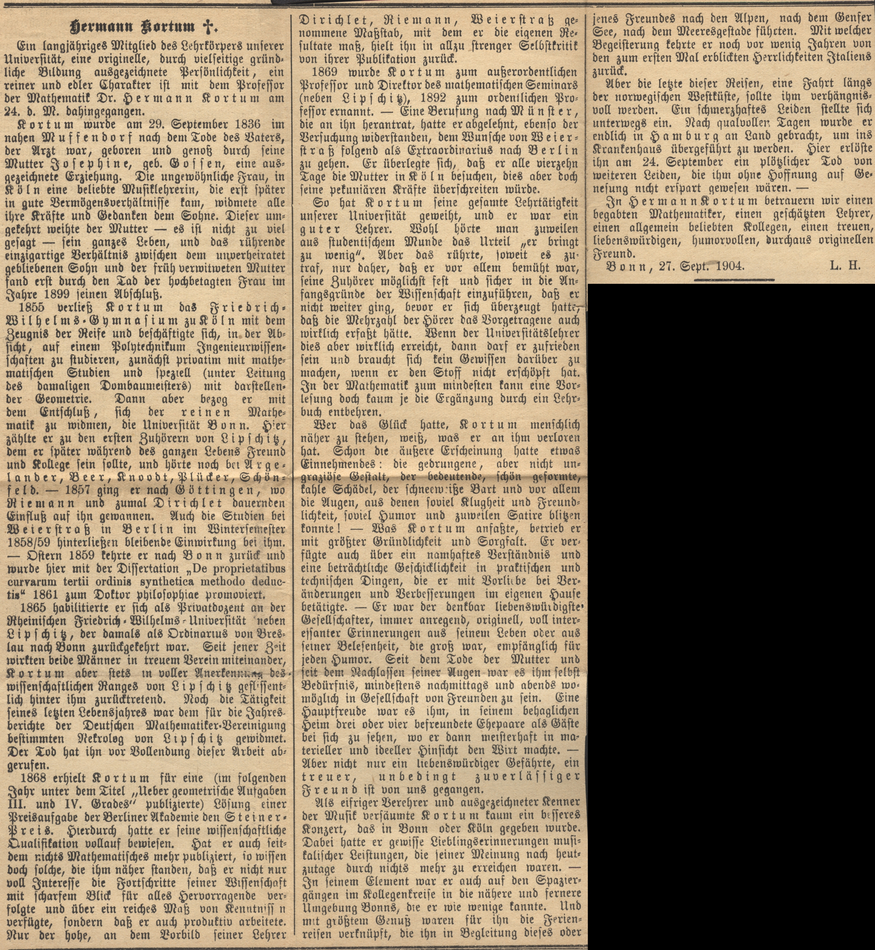 Nachruf auf Prof. Dr. Hermann Kortum (1836-1904)